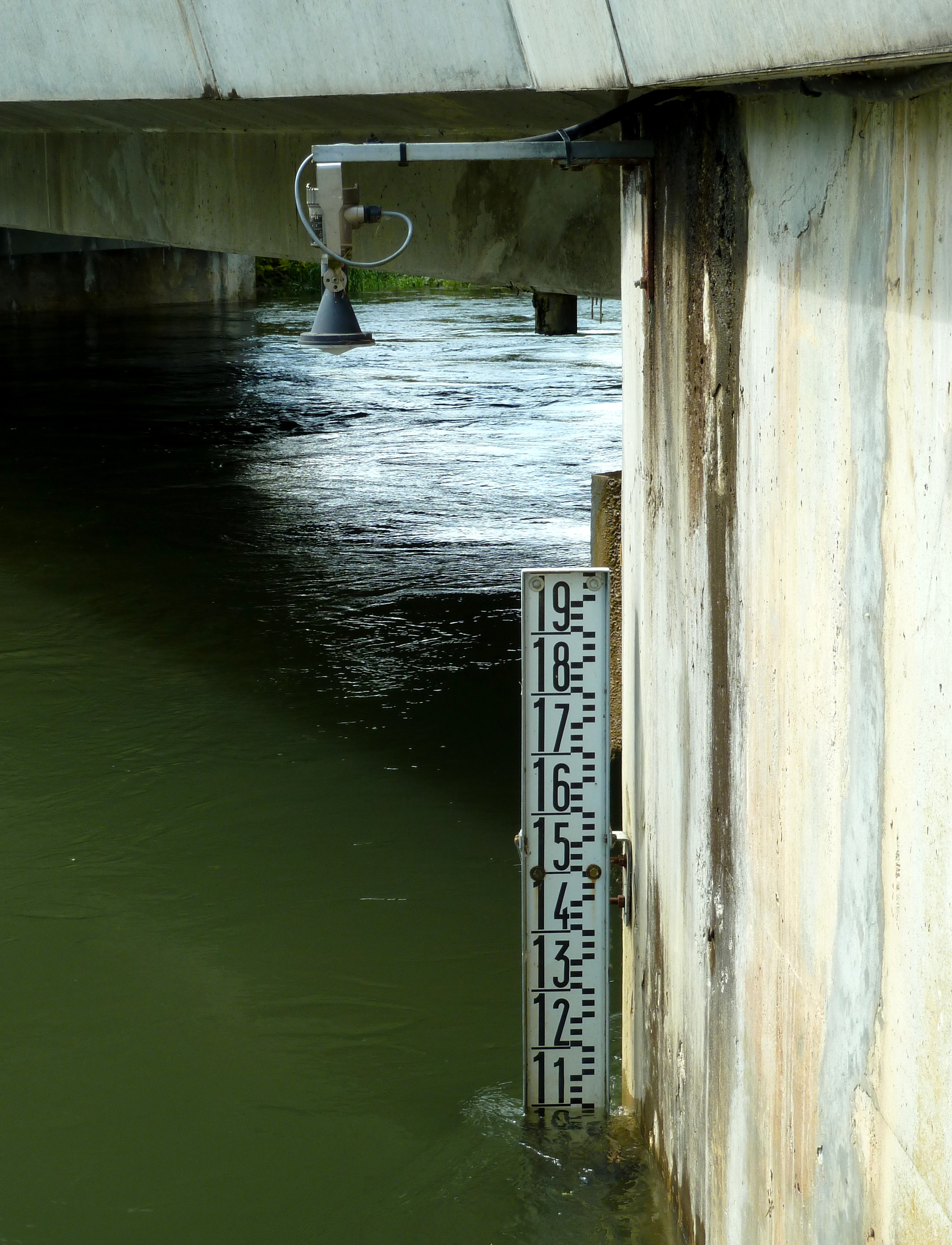 Système de relevé de niveau et de débit automatisé de l'Ource sur le pont de la commune d'Autricourt (Côte-d'Or). Le 17 juin 2016, niveau de crue moyenne haute.